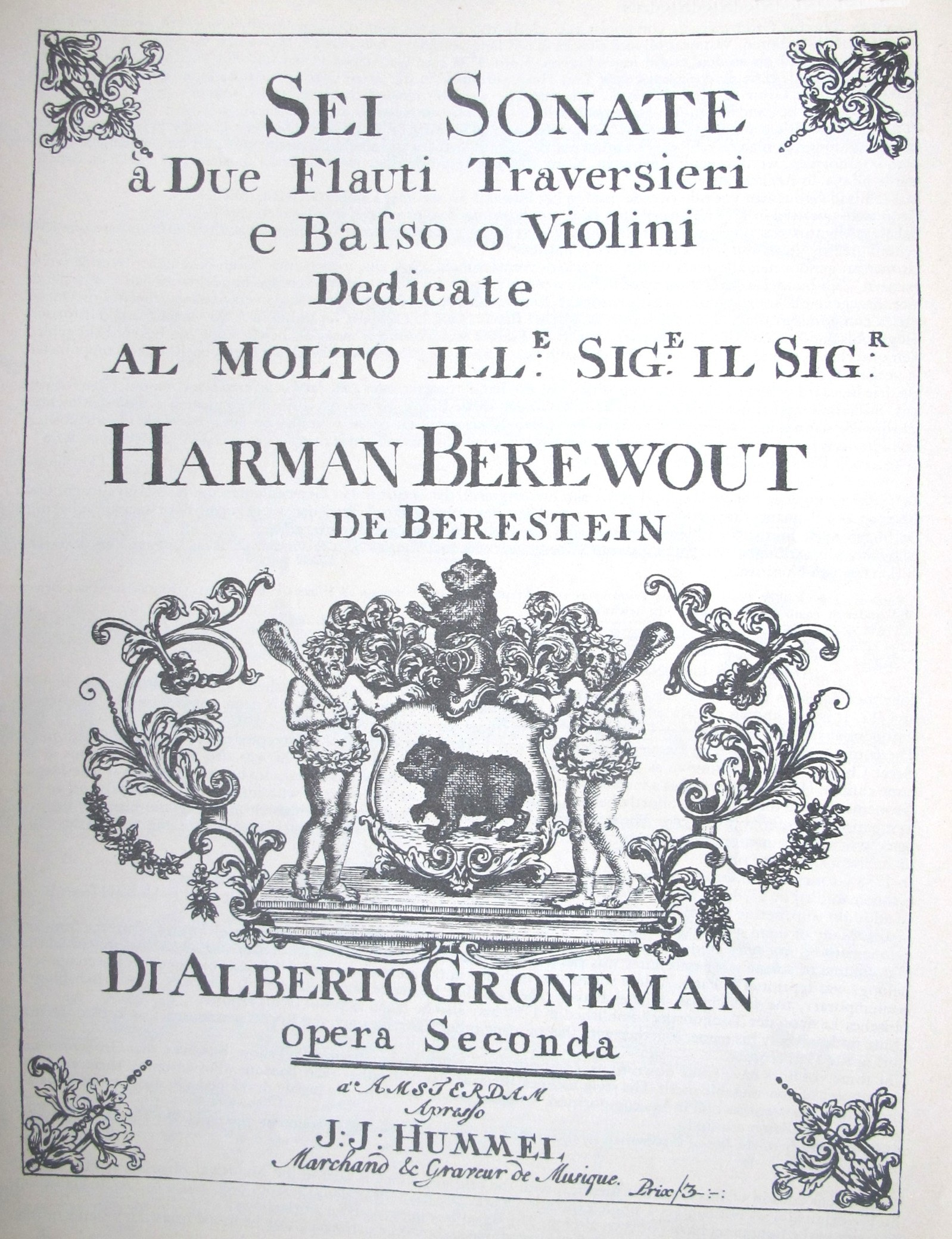 Frontispiz der Sei Sonate a due Flauti traversieri e violone o violini von Albertus Groneman